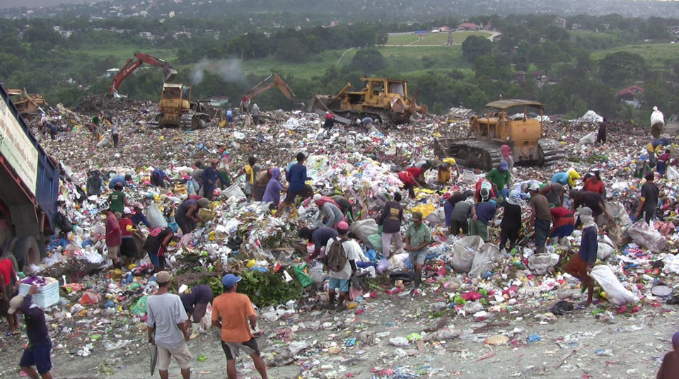 Payatas Dumpsite, Metro Manila, Philippines